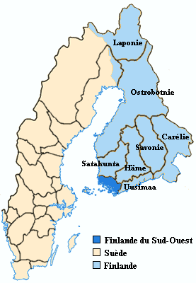 Travail maison à partir de la version wikipedia anglophone